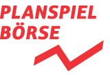 Planspiel-Börse-Logo